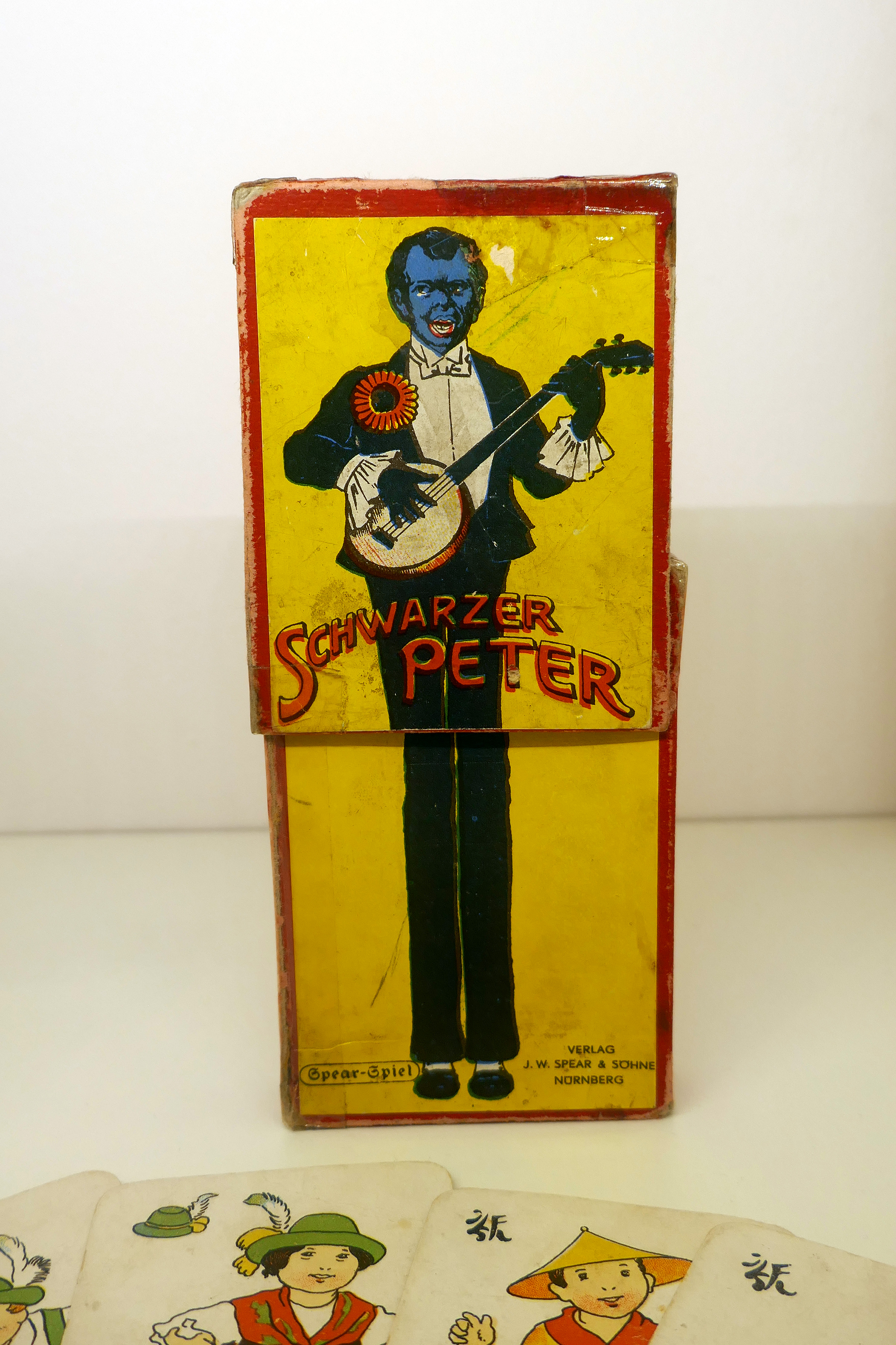 Schwarzer Peter Verlag J.W. Spear & Söhne. Nürnberg, um 1920 Pappe, bedruckt. Museum im Ritterhaus (Offenburg). Ein Fenster zur Welt. Die kolonialzeitliche Sammlung.